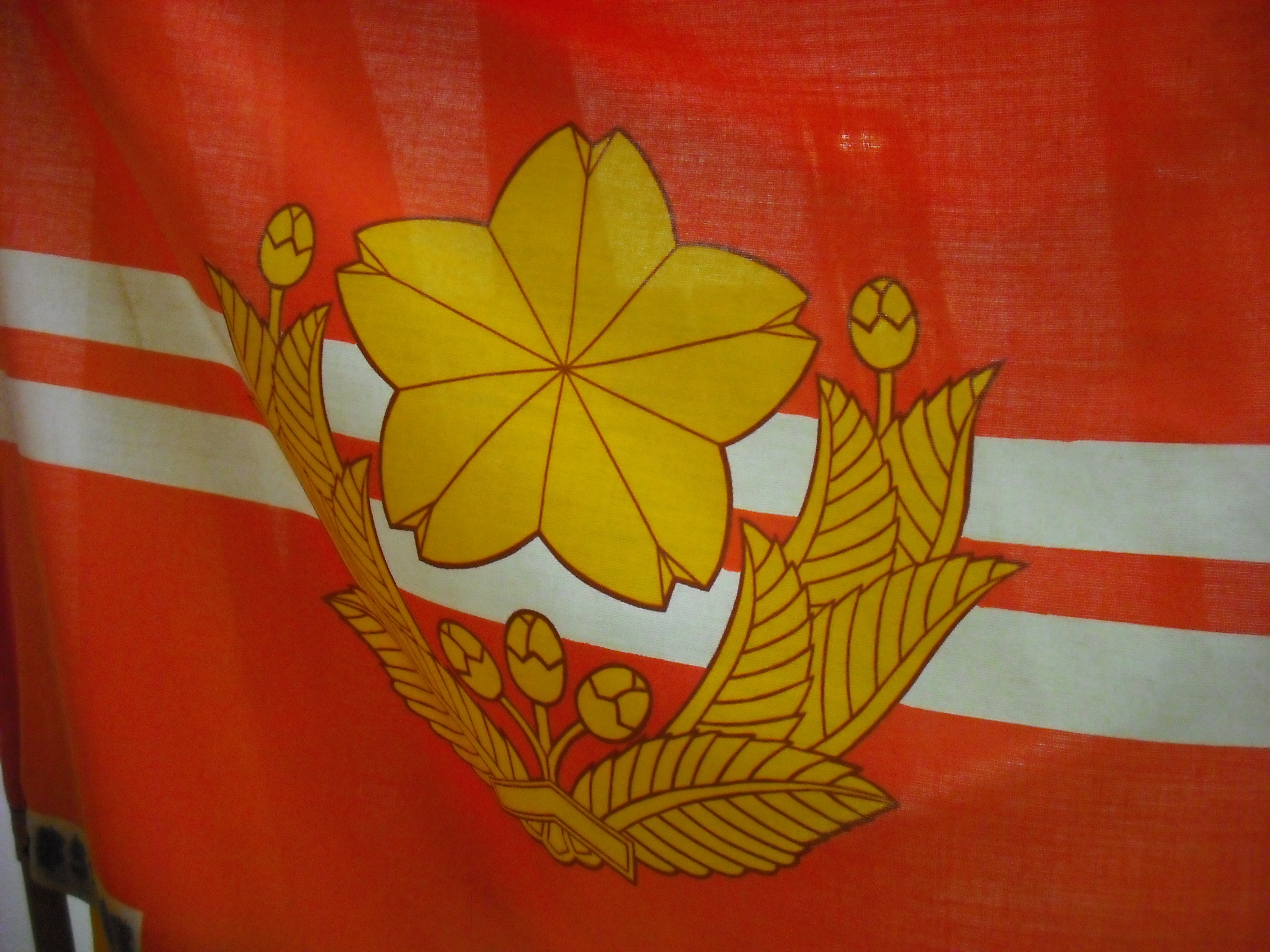 旅団化改編で廃止となった第5対戦車隊の隊旗（帯広駐屯地にて）